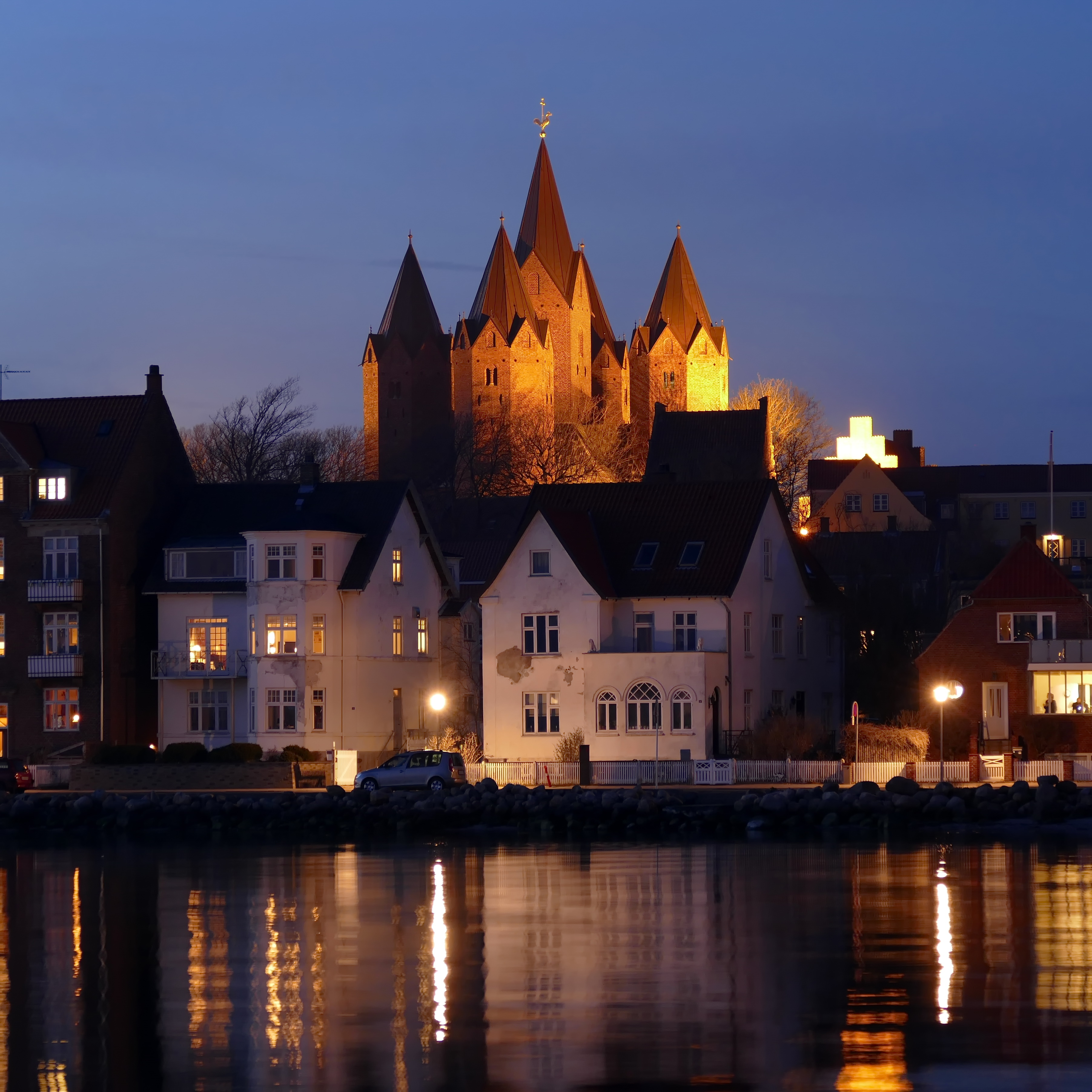 Vor Frue Kirke